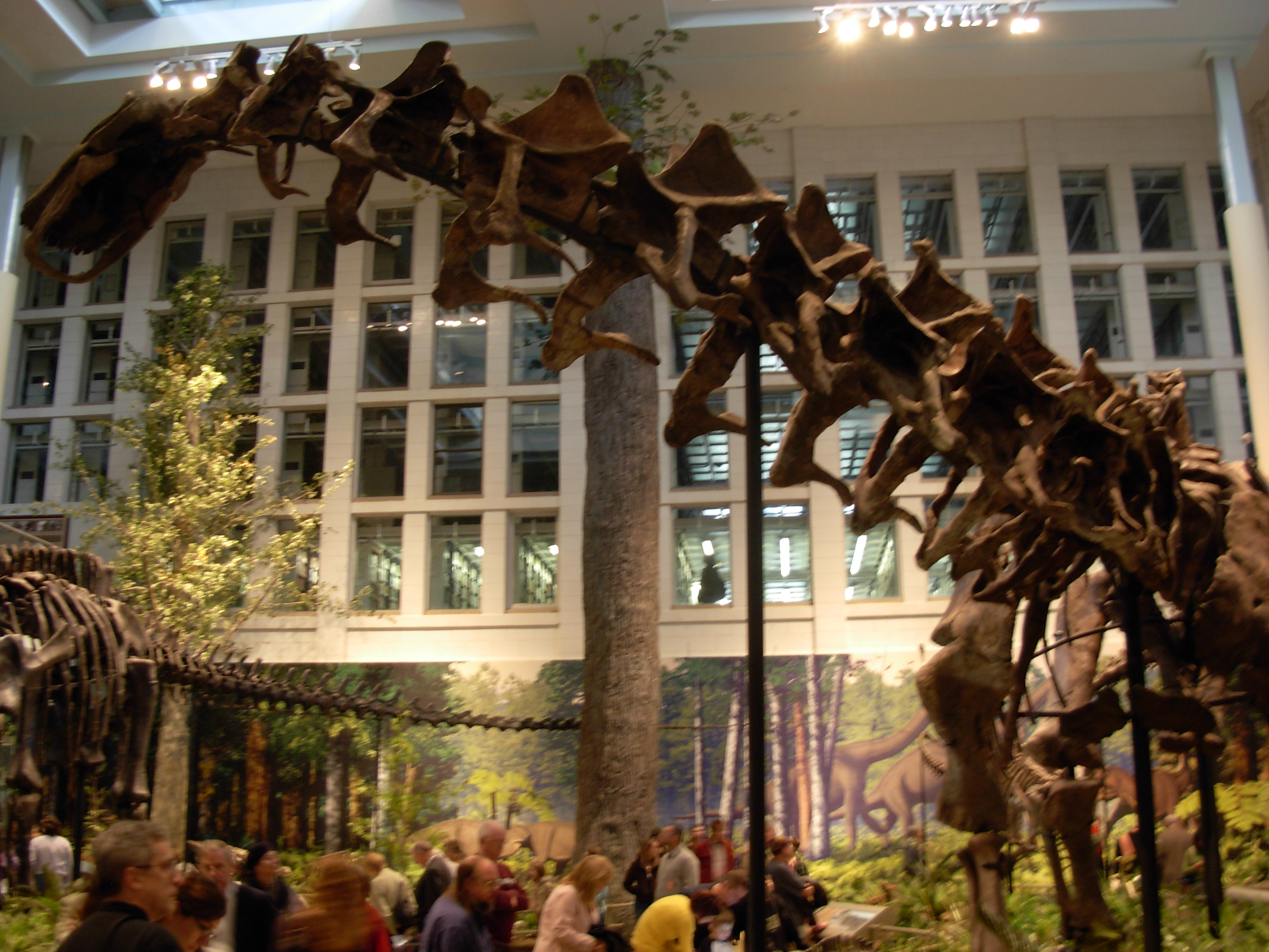 Apatosaurus